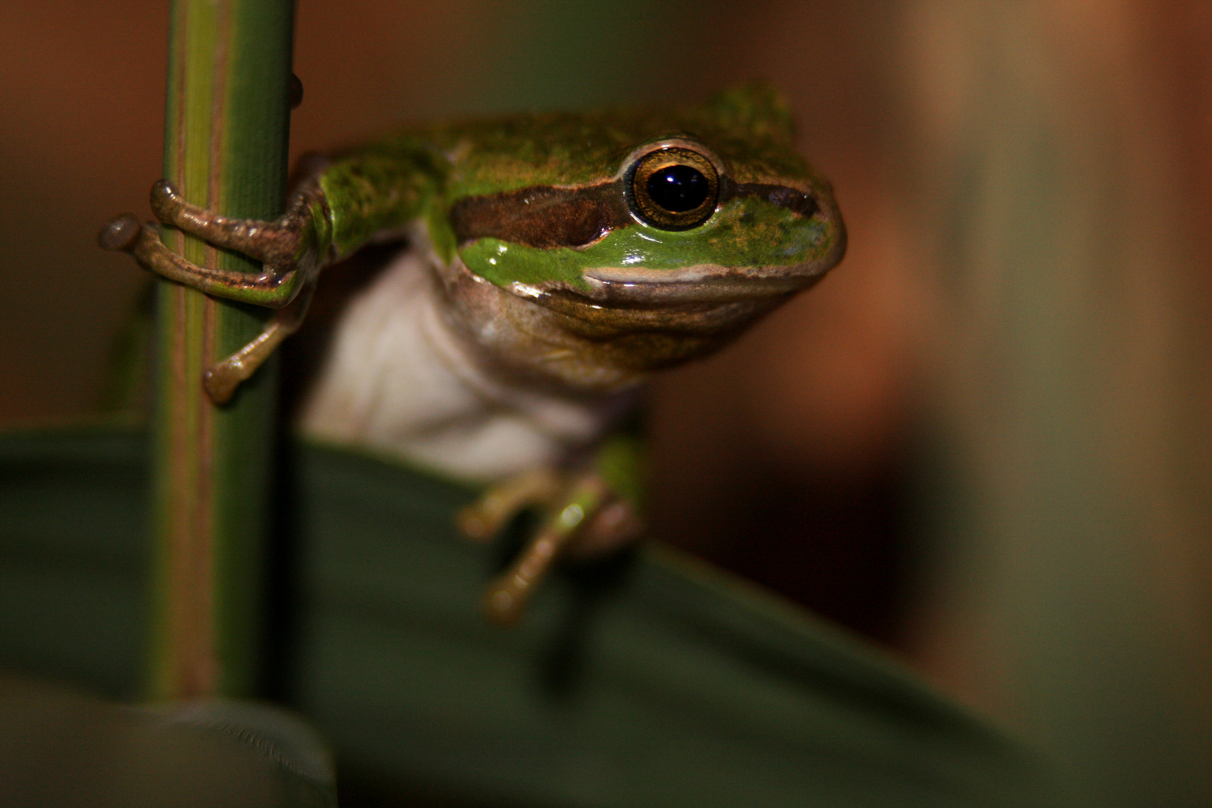 Az éjszakai erdei ösvény egyik lakója